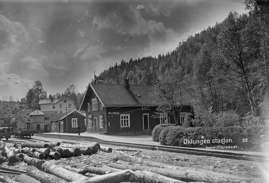 Oklungen stasjon på Vestfoldbanen. Foto: Enoch Djupdræt, fra billedbasen Marcus.